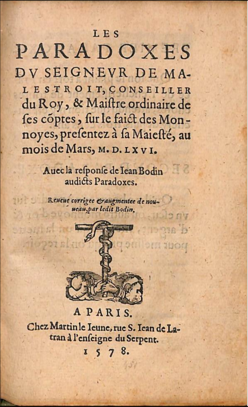 Les paradoxes.